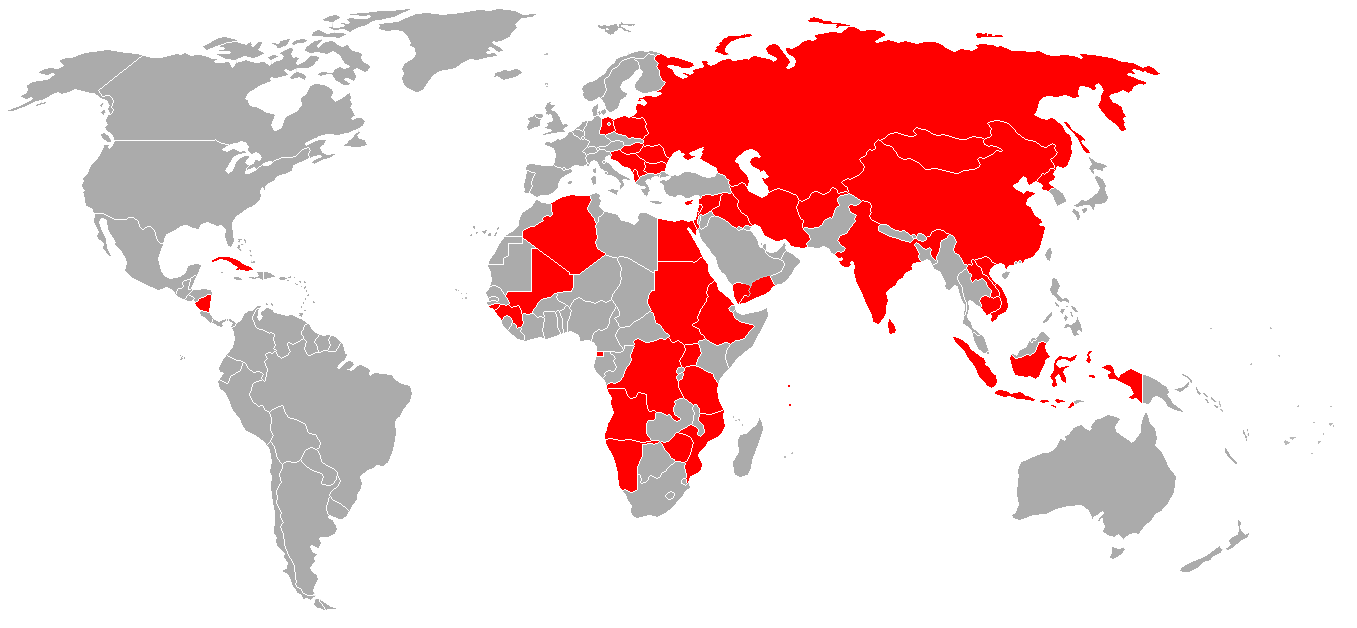 A map over BTR-152 operators